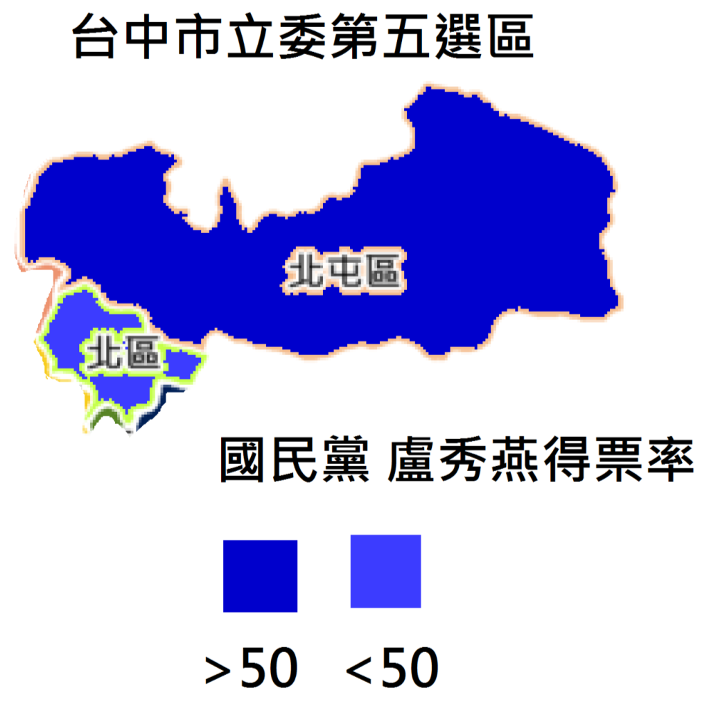 2016台中立委第五選區各區得票率